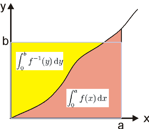 Verdeutlichung der Youngschen Ungleichung